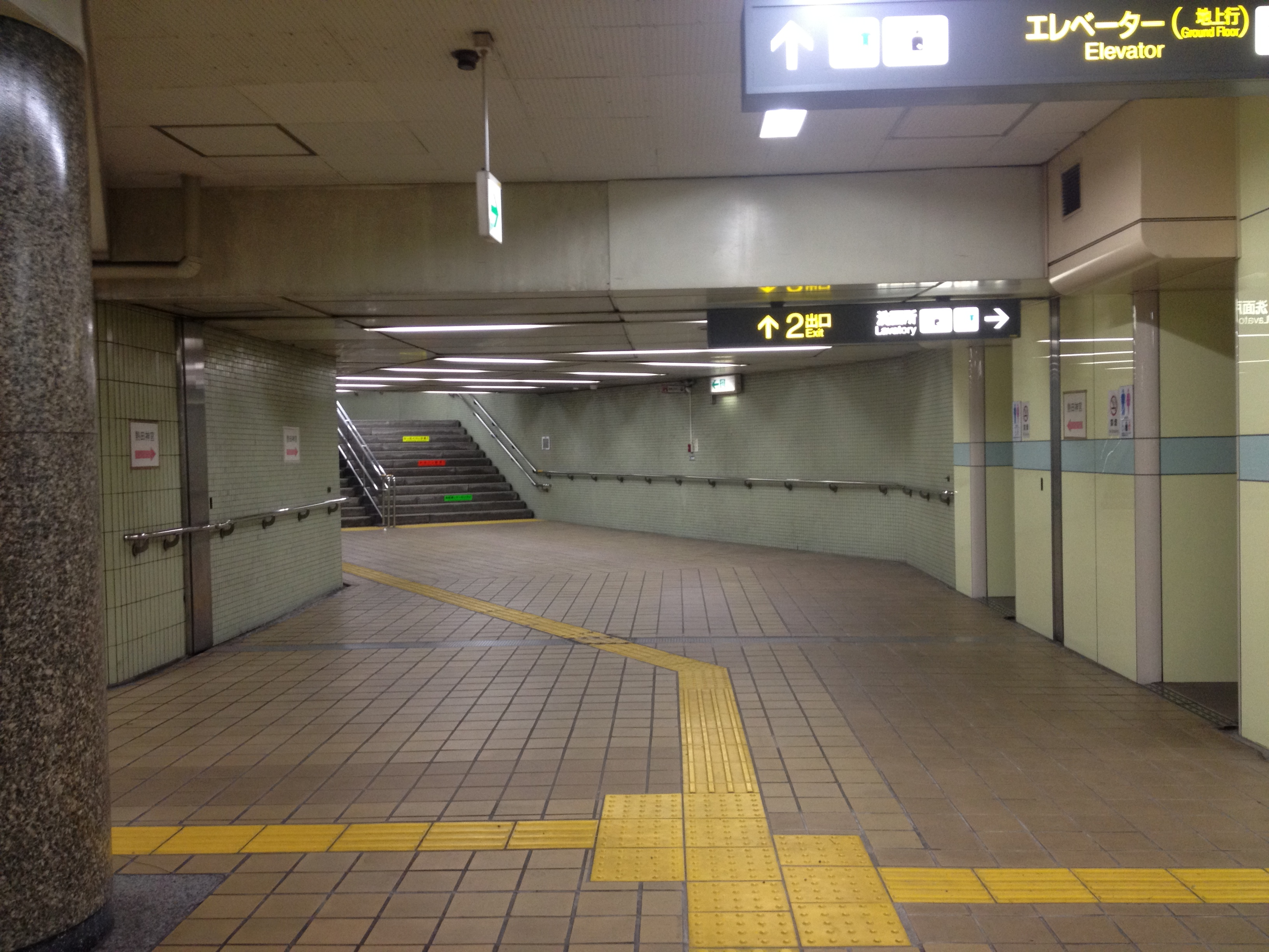 名古屋市営地下鉄 神宮西駅 2番出口への通路